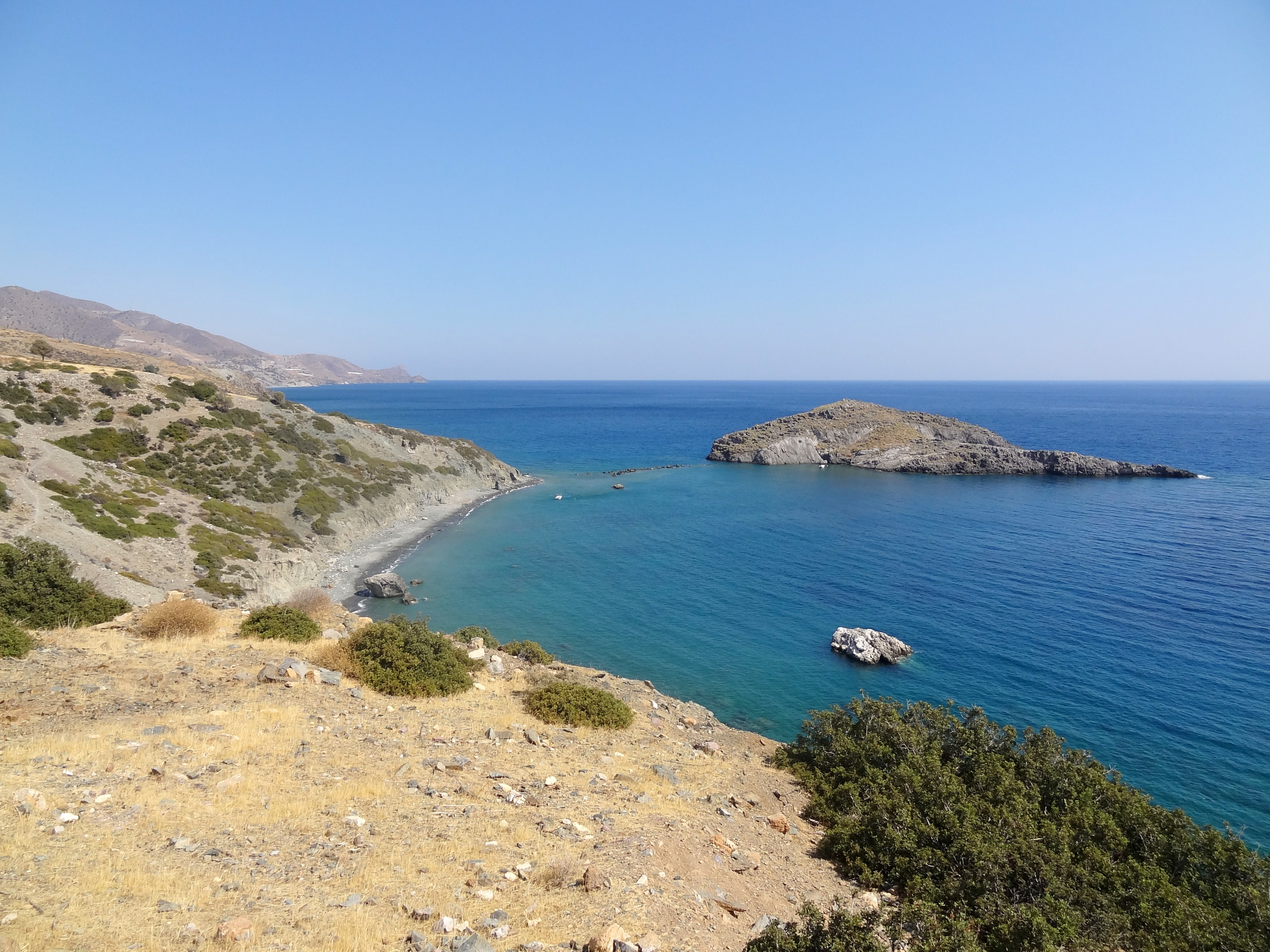 Insel Trafos (Τράφος) vor der antiken Stätte von Lasaia, Gemeinde Festos, Regionalbezirk Iraklio, Kreta, Griechenland